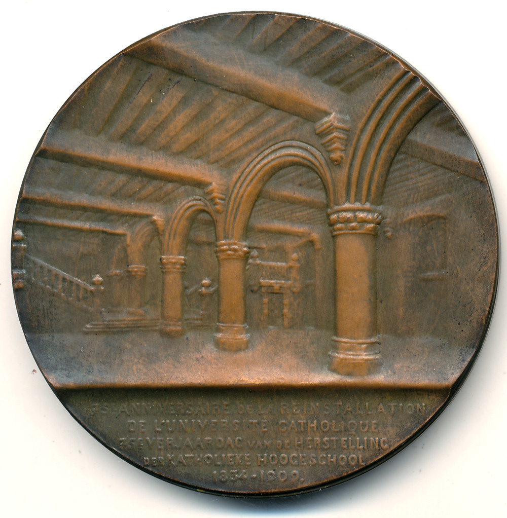 Revers de la médaille du 75ème Anniversaire de la Réinstallation de l'Université Catholique de Louvain 1834-1909, signée Frans Vermeylen, bronze, 60mm, la grande et belle salle des pas-perdus des Halles de Louvain.